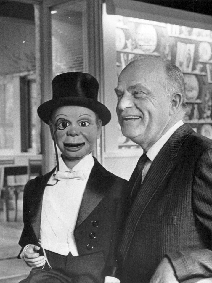 Filmkomikern Edgar Bergen med sin docka Charlie McCarthy.Charlie McCarthy har kommit till stan för att för att under ett tiodagars gästspel via sin andliga faders mage glädja publiken på Gröna Lund med sina snusförnuftiga kommentarer. Den svenskättade buktalaren Edgar Bergen och hans svartklädda docka med det skojiga ansiktet gör nu sitt tionde besök i Sverige och behöver väl knappast någon närmare presentation.